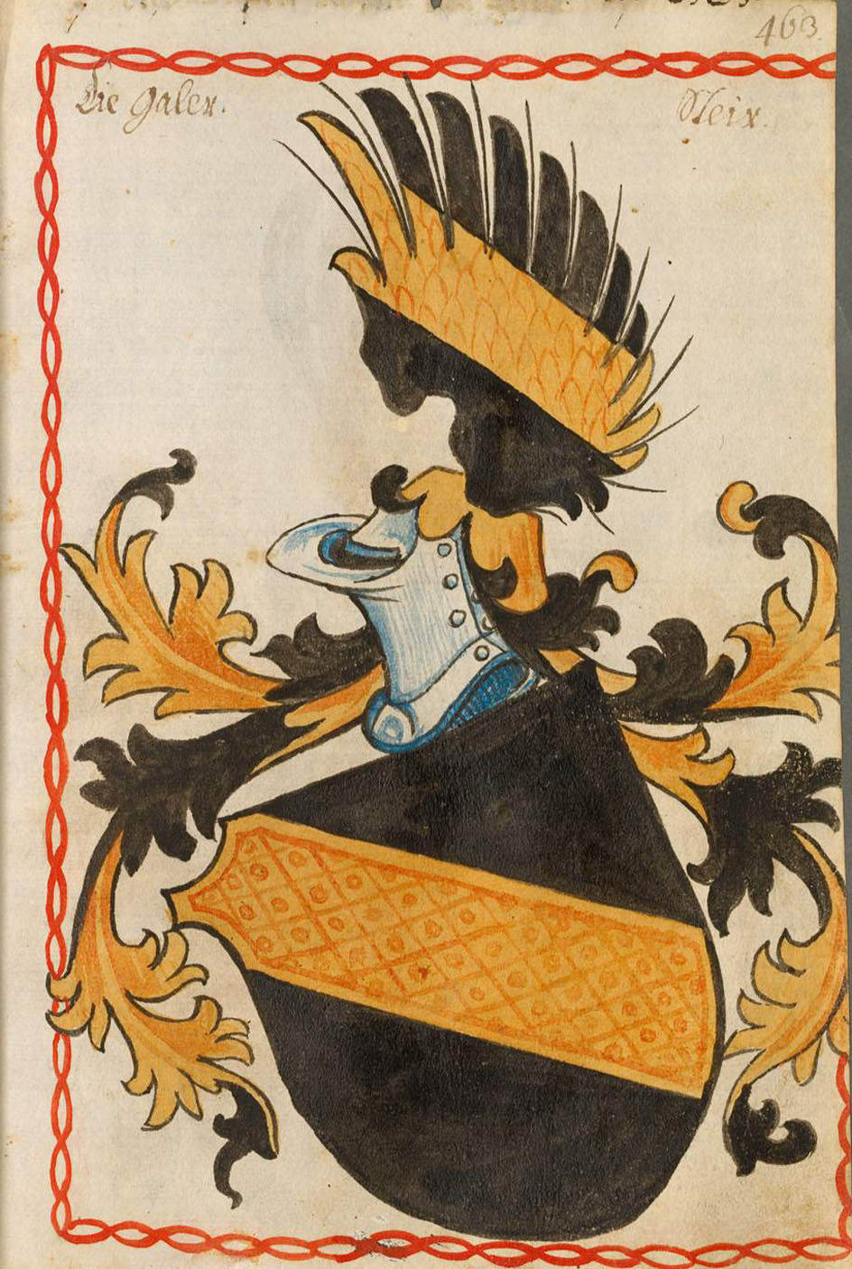 Scheibler'sches Wappenbuch , älterer Teil Steyrer Seite 463